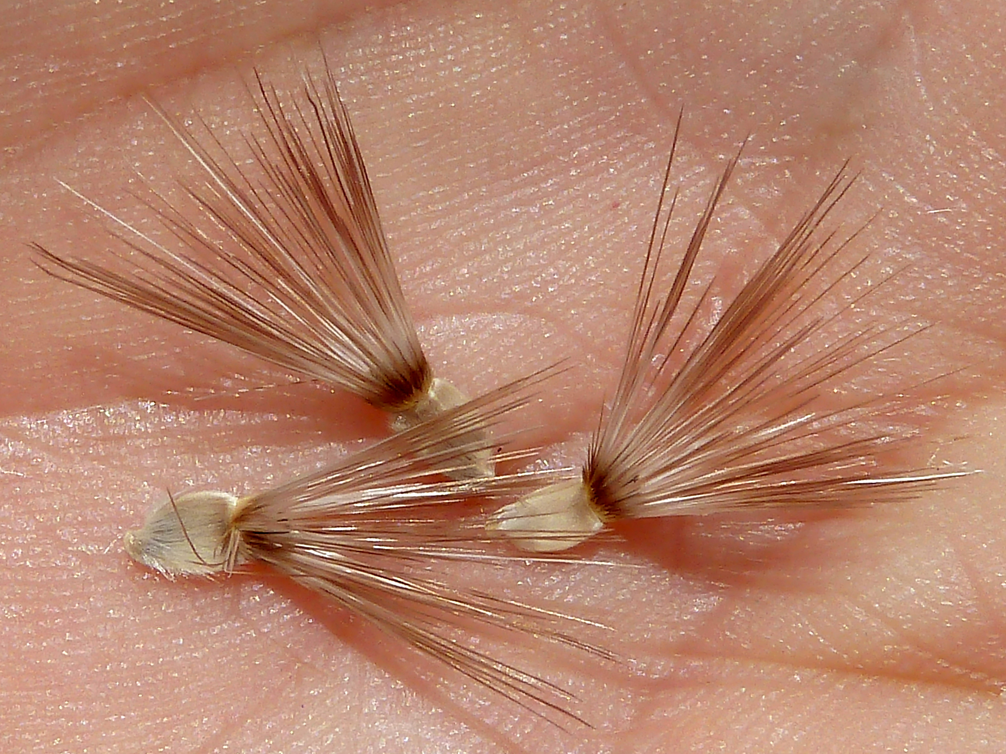 Centaurea ornata (Abrepuños) : Cipselas sueltas - Avda del Ventero de la Condesa, El Saceral, Madrid capital (España).